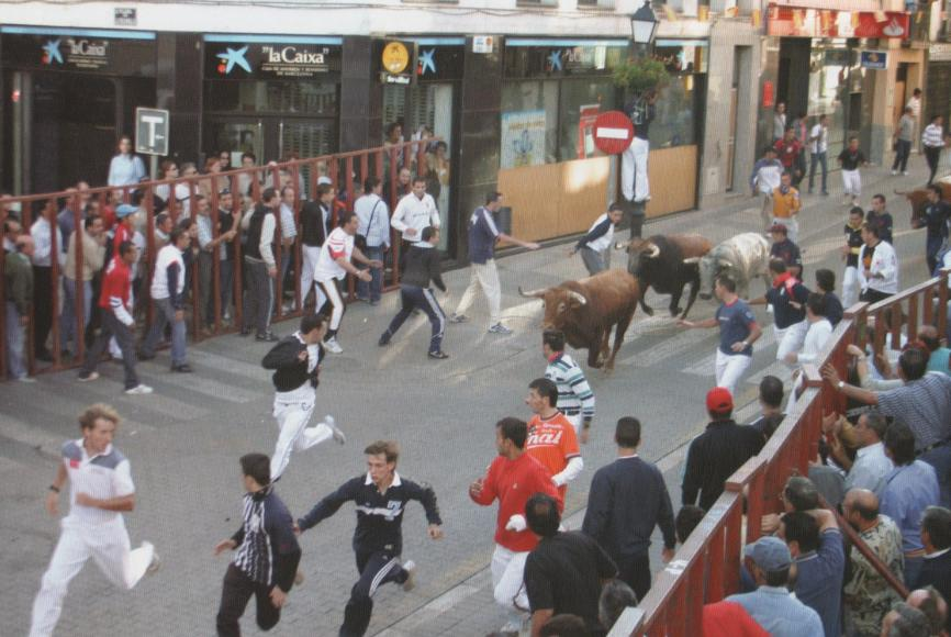 Encierro por la calle Real de Arganda en 2005